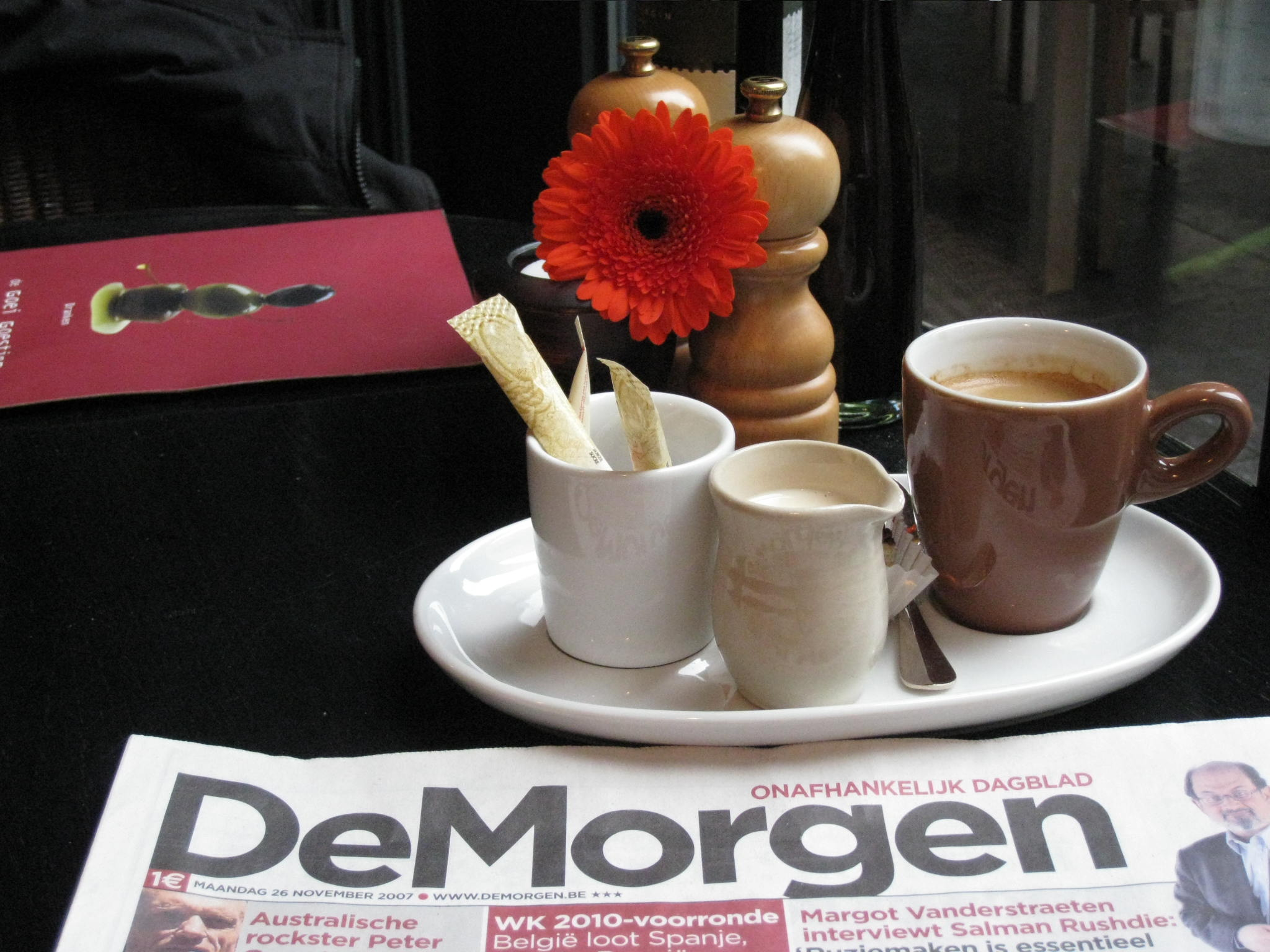 "De Morgen" van 26 november 2007 bij de koffie